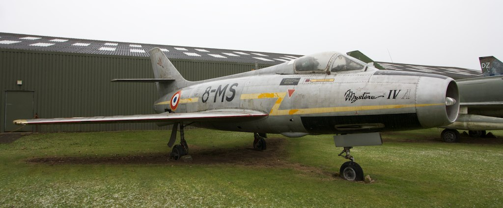 Dassault Mystere IV A